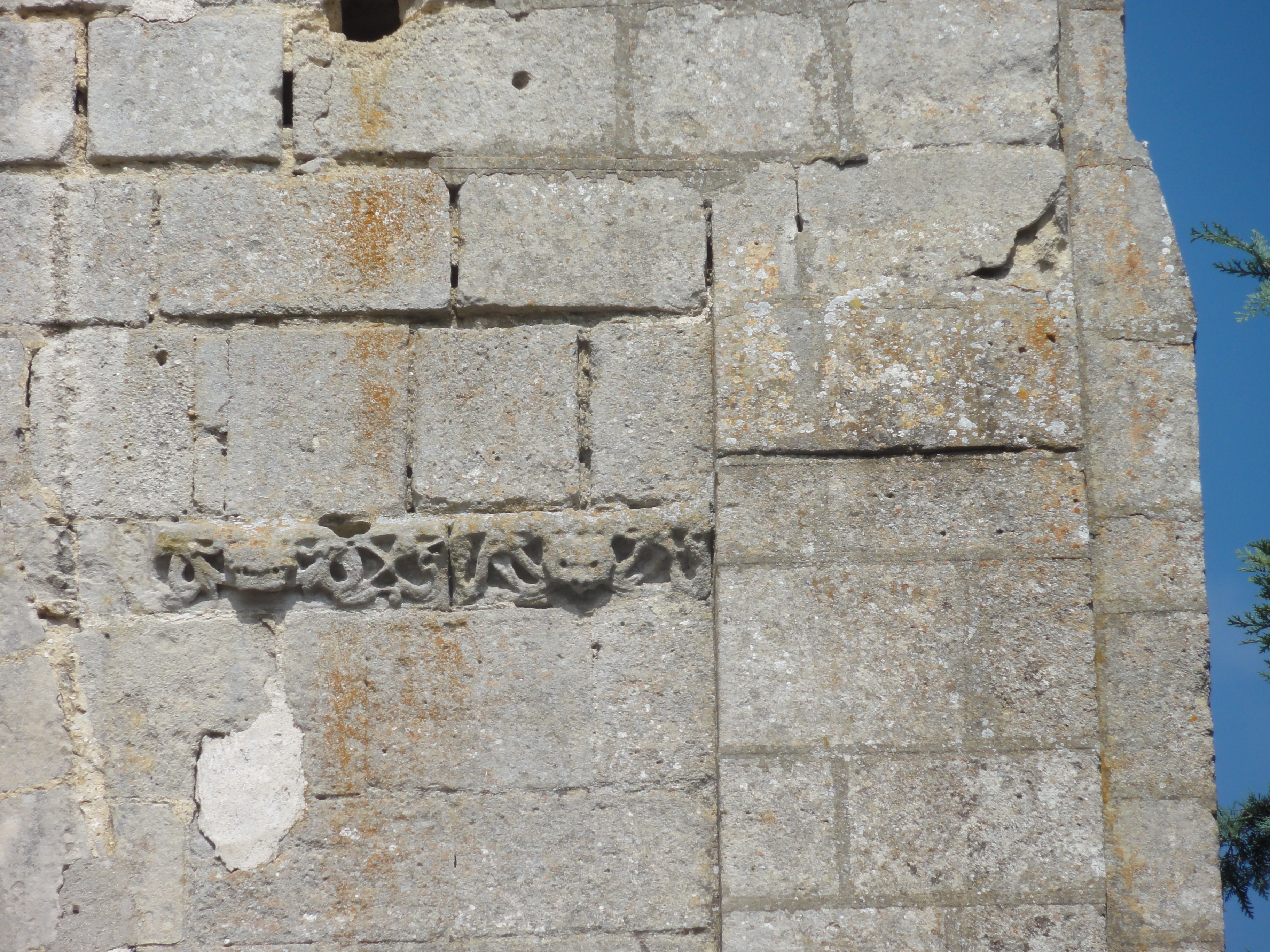 Frise de rinceaux sur l'abside, côté sud.